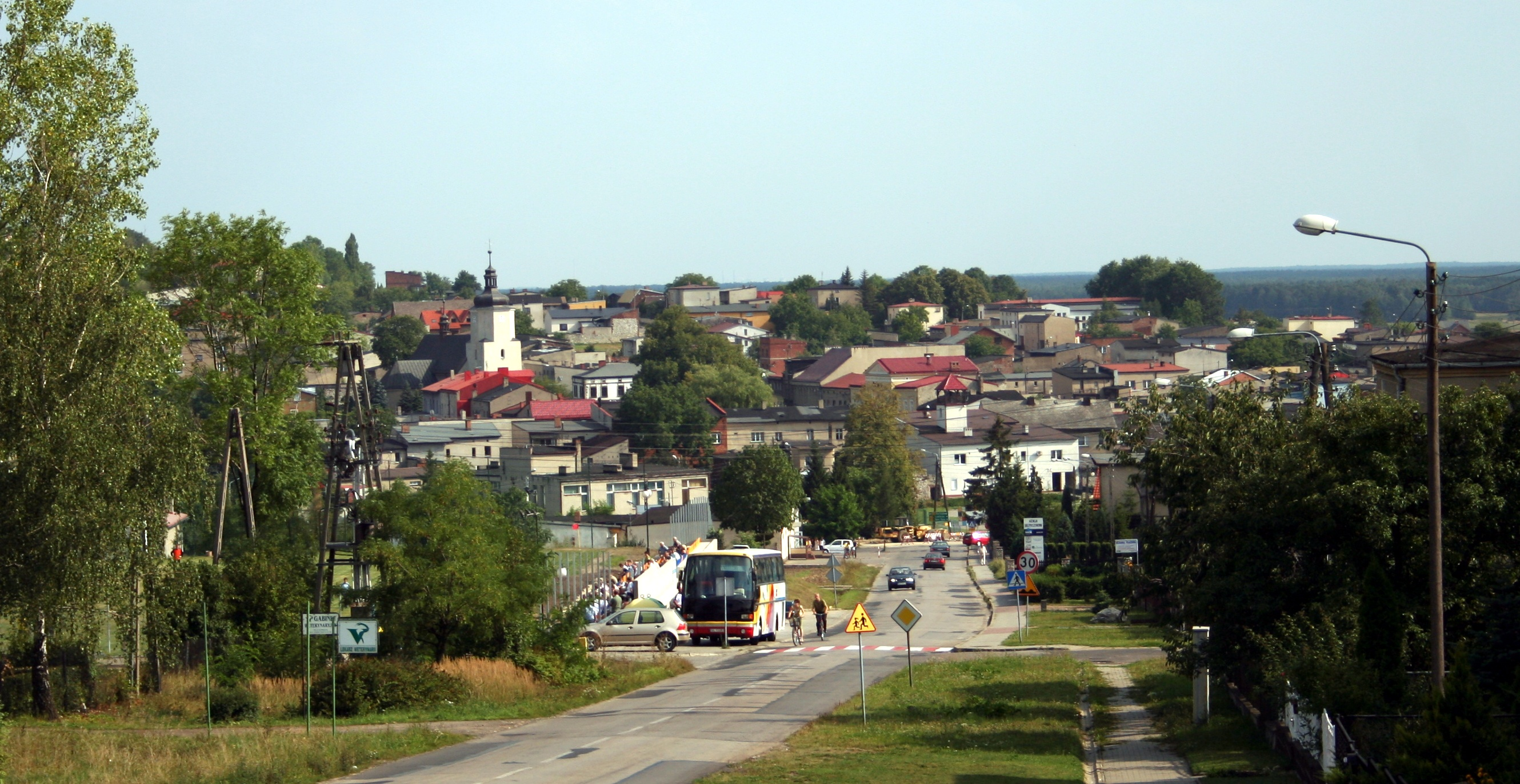 Panorama Woźnik, powiat lubliniecki